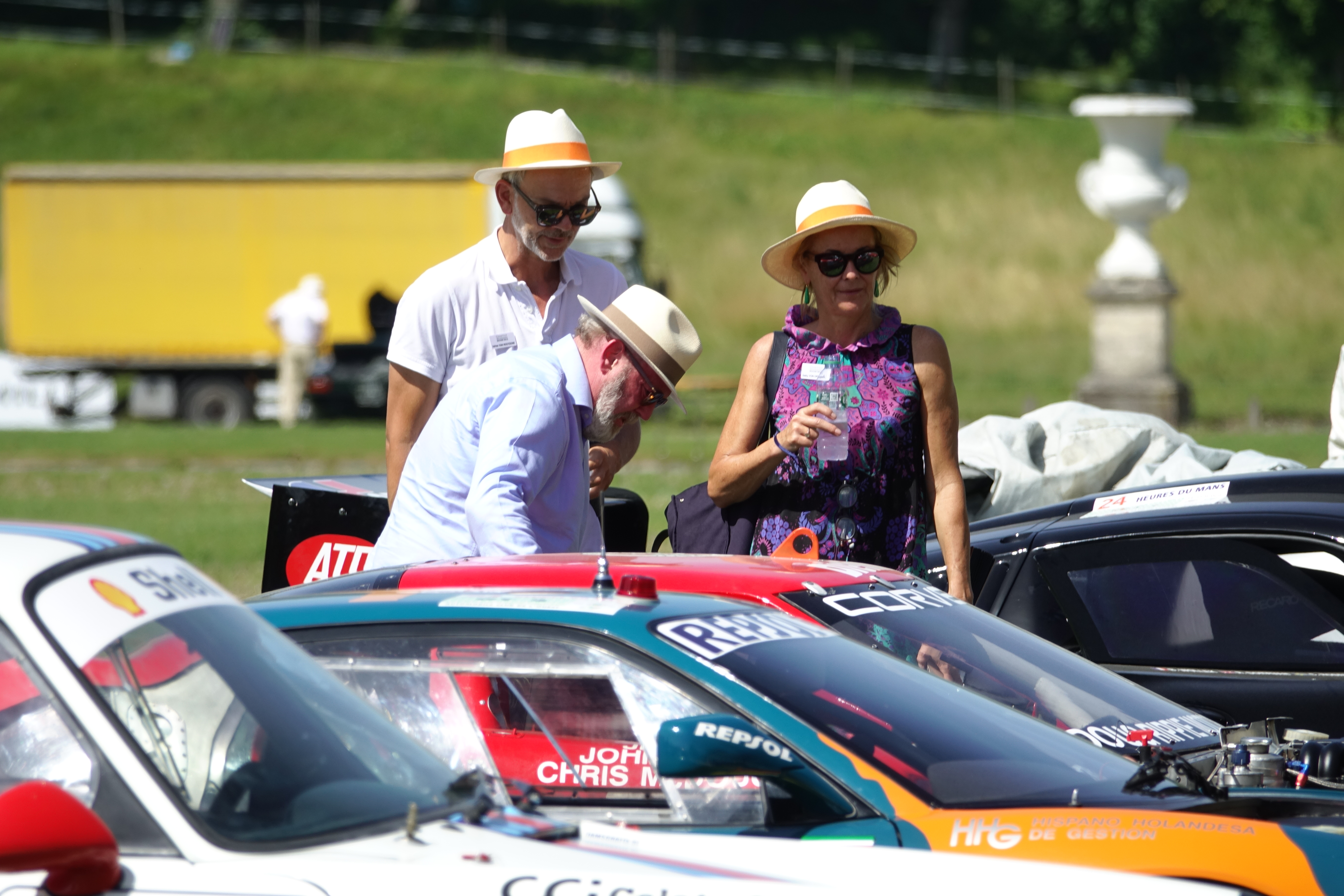 Jury du Chantilly Arts & Elegance Richard Mille 2019 (Nicola Von Donhoff,Adrian van Hoodyonk, ...)